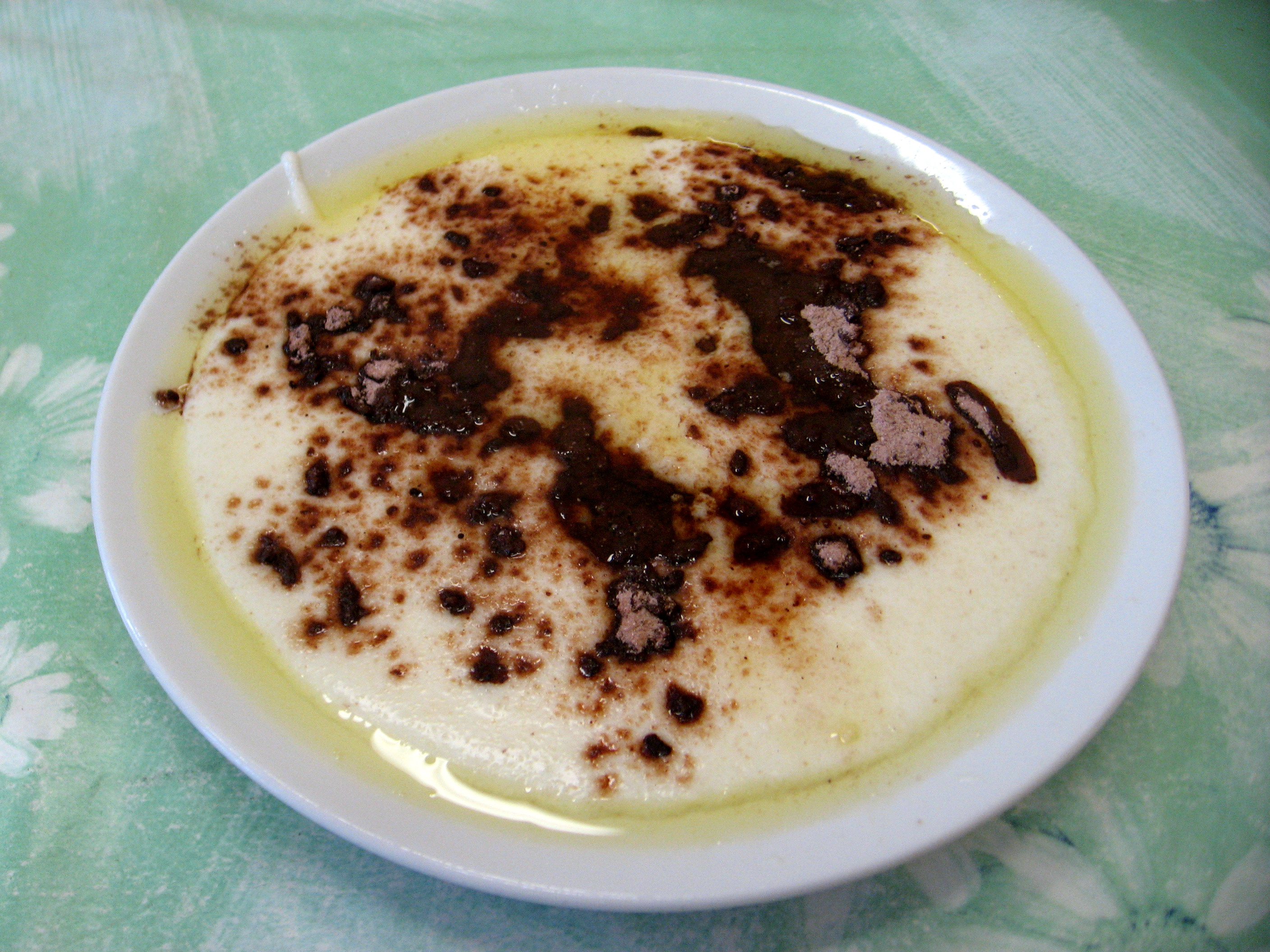 Krupicová kaše posypaná kakaem a politá omastkem